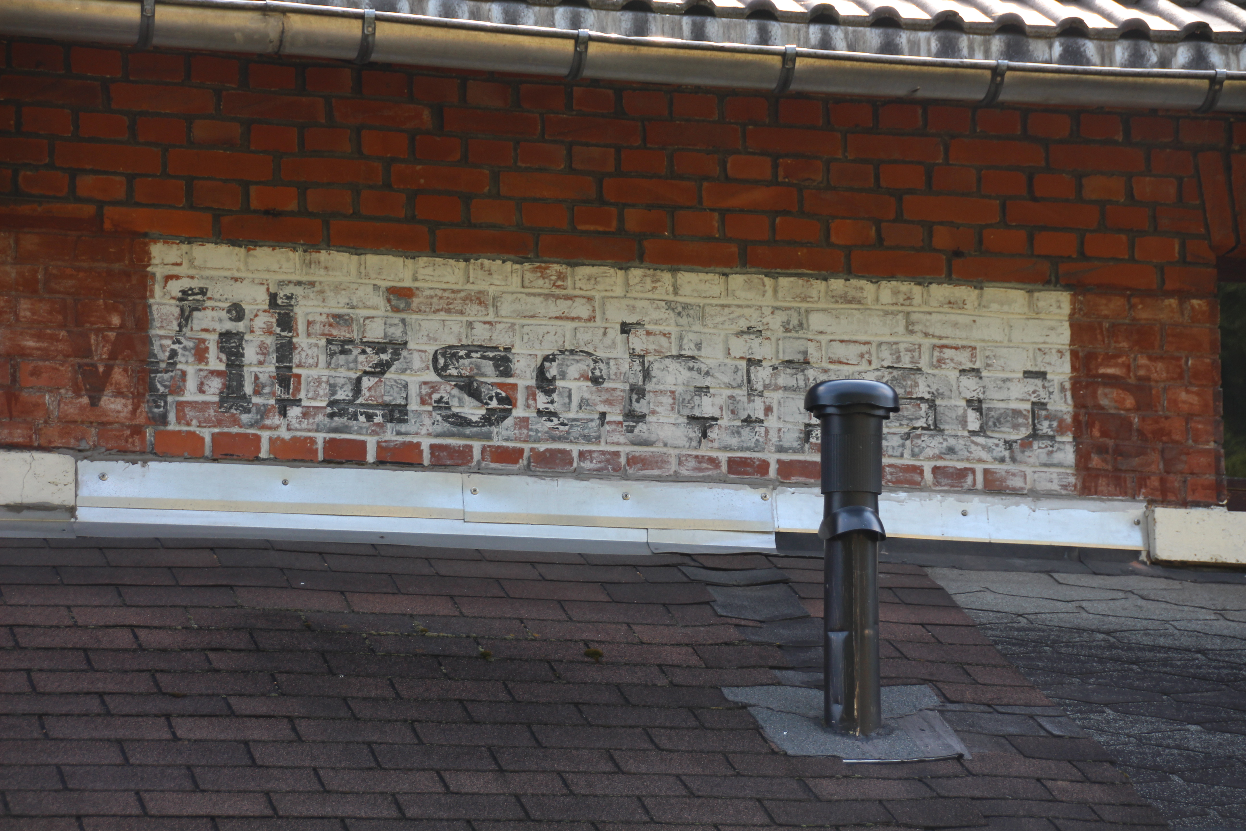 Auf dem früheren Bahnhof Schönheide Süd im westlichen Erzgebirge betreibt der Verein Historische Westsächsische Eisenbahnen Homepage des Vereins nicht nur einen Museums-Fahrbetrieb in Richtung Muldenhammer. Er hat eine Reihe von historischen Lokomotiven und Waggons gesammelt, die die Mitglieder des Vereins restaurieren. Der Verein baute im Bahnhofsbereich einen Teil der Schienen der Schmalspurbahn Wilkau-Haßlau–Carlsfeld wieder auf. Er unterhält, repariert und restauriert insbesondere die Gleise, Weichen und sonstigen Bahnanlagen im Normalspurbereich des früheren Bahnhofs, der eisenbahngeschichtlich eine Besonderheit war, als er sowohl Bahnhof für die 750-Millimeter-Bahn war und zugleich für die Normalspur-Bahnstrecke Chemnitz–Adorf. Diese Bahnstrecken kreuzten sich in Wilzschhaus, ohne sich zu berühren, weil die Gleise über Brücken geführt wurden. Durch Gleisübergänge konnten über Rollböcke Normalspurwagen auf der Schmalspurstrecke transportiert werden. Diese Technik ist durch den Verein wieder betriebsbereit gemacht worden. Sie wird bei Veranstaltungen des Vereins vorgeführt. Haus am Bahnübergang: Als die Bahnstation noch "Wilzschhaus" hieß - vor 1950 angebracht.